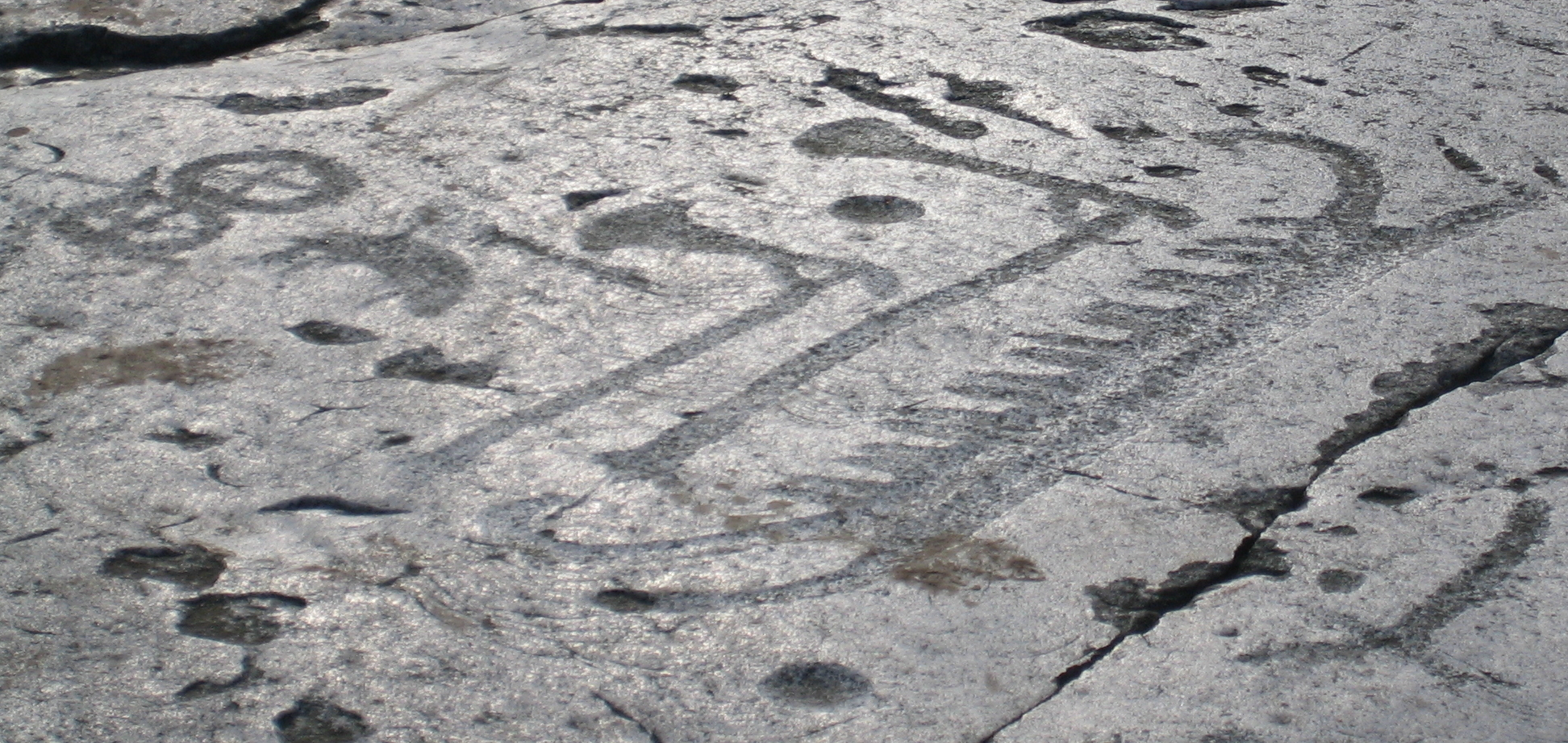 Petroglyph in Simrislund, Sweden